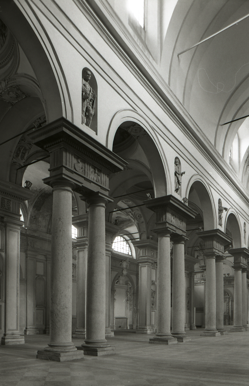 Servizio fotografico : Piacenza, 1981 / Paolo Monti. - Strisce: 2, Fotogrammi complessivi: 7 : Negativo b/n, gelatina bromuro d'argento/ pellicola ; 35 mm. - ((Sul portanegativi: N[I]K[MA]T FP4 e iscrizione: "S. Agostino 2/8". - Occasione: Documentazione mostra I.P.A.B. "Arte e pietà" a Piacenza (su ordinazione del Professor Andrea Emiliani). - Fonte: Agenda di Paolo Monti: Nikon Leika 3001-/ Monti 1978 (1978), presso Archivio Paolo Monti. - Fonte: Fattura di Paolo Monti: IV. Commesse/ Fattura n. 18/ Riprese per Mostra Arte e pietà a Piacenza (1981/08/05), presso Archivio Paolo Monti. N. 50 riprese a Piacenza e Castell'Arquato per Mostra a Piacenza I.P.A.B. - Fonte: Monografia: Arte e pietà: i patrimoni culturali delle Opere Pie nella provincia di Piacenza, catalogo della mostra, Piacenza 1981, Bologna, CLUEB (1981)